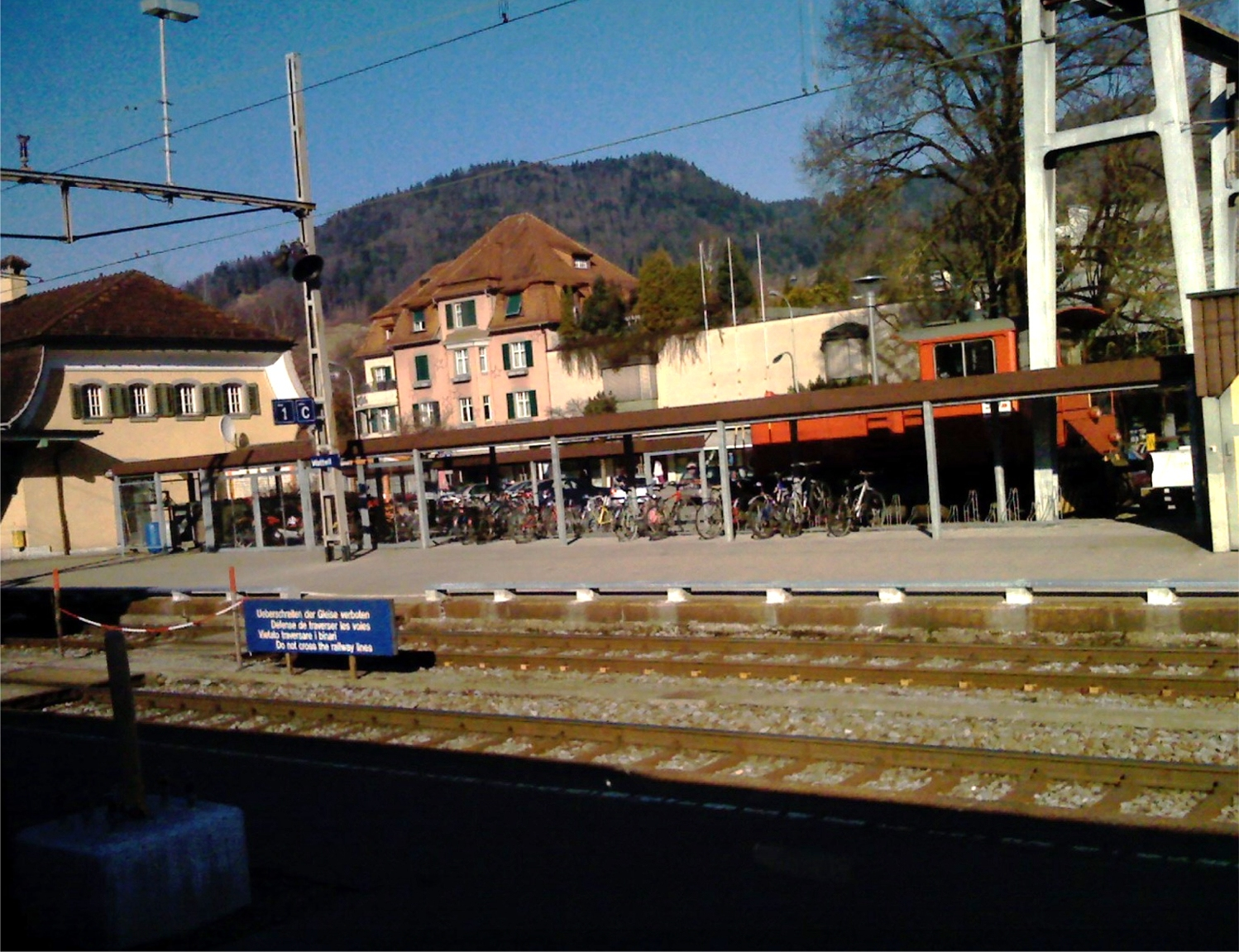 Wattwil, Toggenburg, Canton of St. Gall, Switzerland - Wattwil, Togenburgo, Kantono Sankt-Galo, Svislando